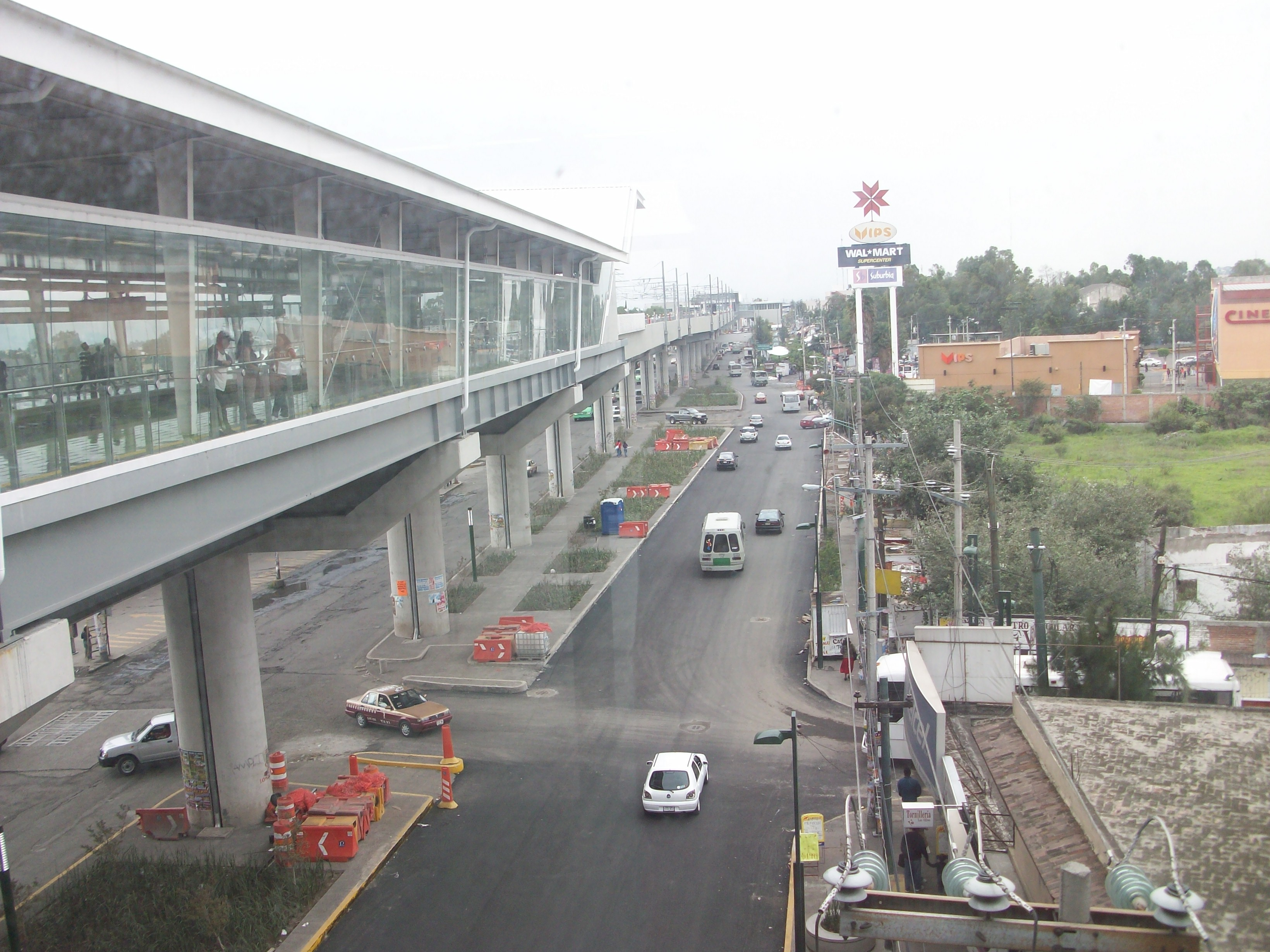 Avenida Tlahuac